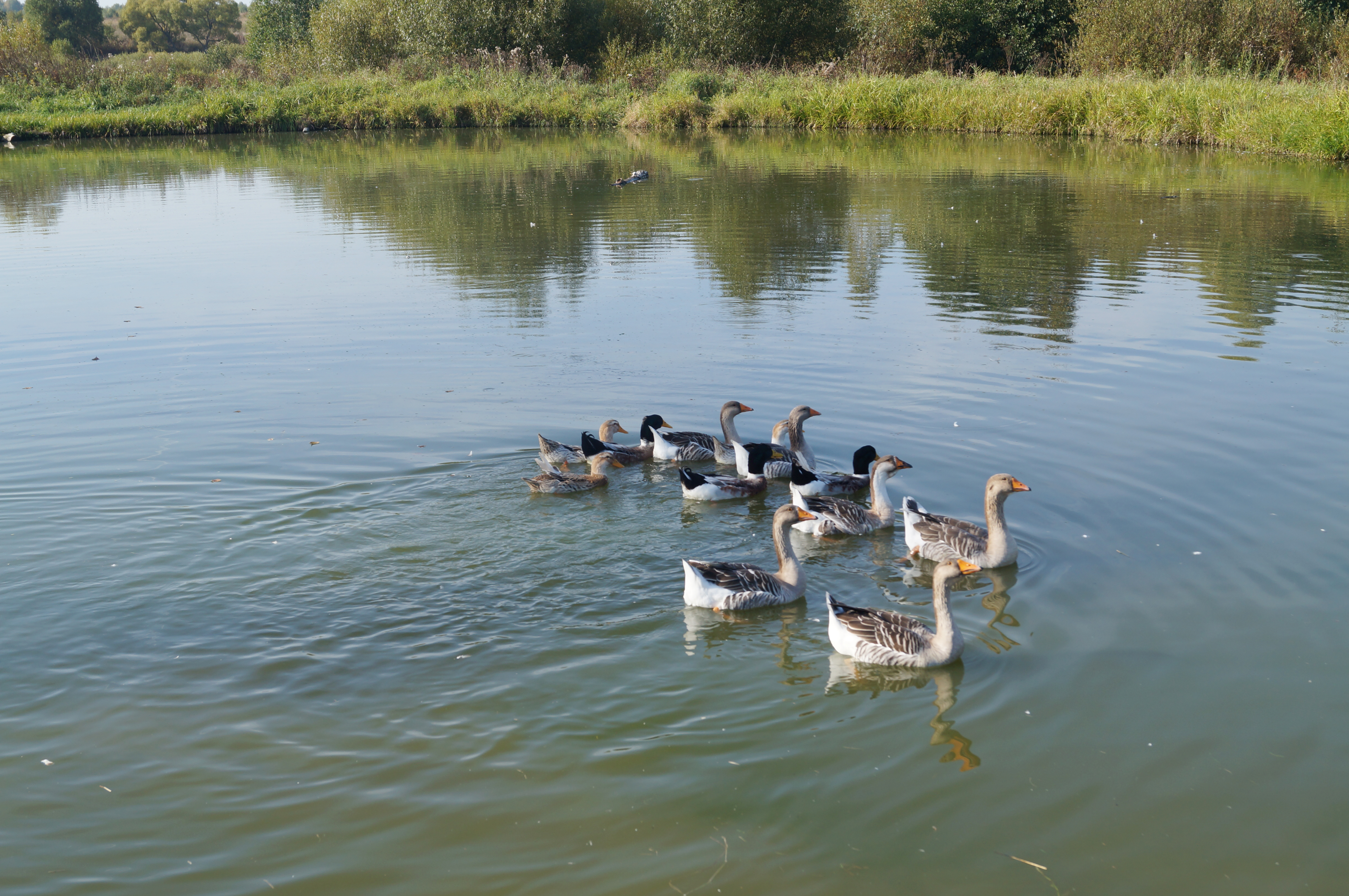 Пруд в Поляне (Думиничский район)